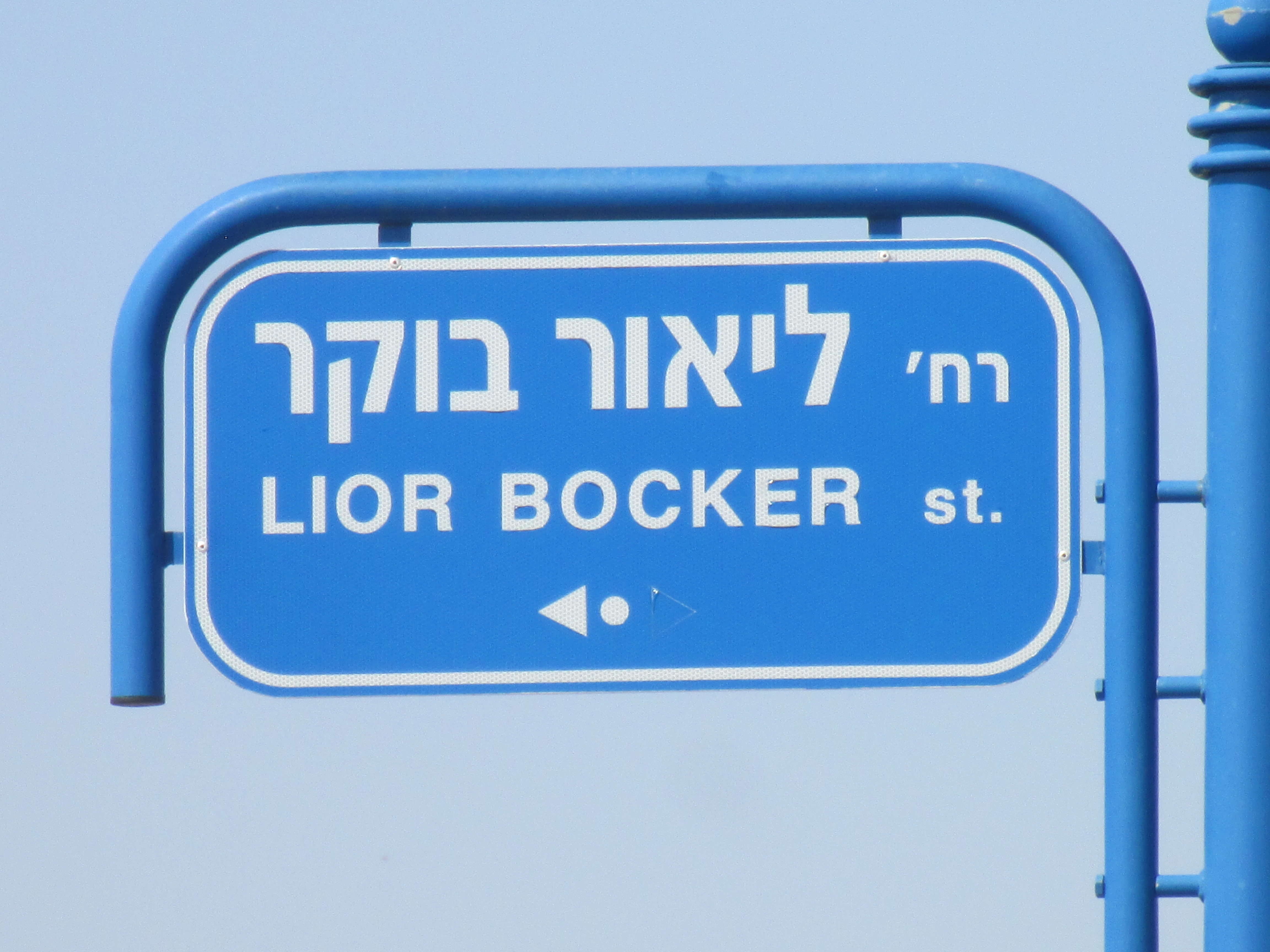 שלט רחוב ליאור בוקר בחדרה